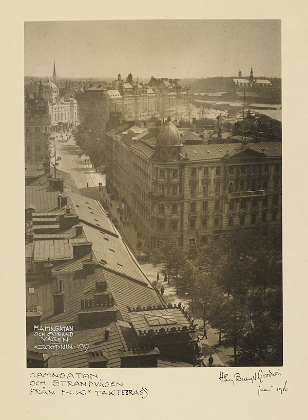 Goodwin, Henry Buergel 1917 Hamngatan og Strandvägen fra N.Ks takterrasse. 24,2 x 16, 5 cm NMFF.003234